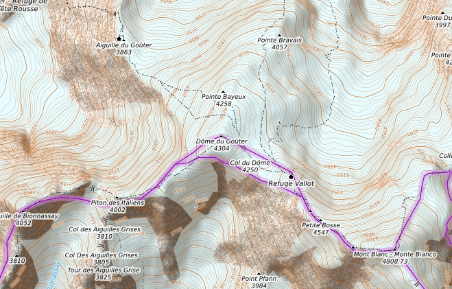 carte réalisée sur umap This map may be incomplete, and may contain errors. Don't rely solely on it for navigation.